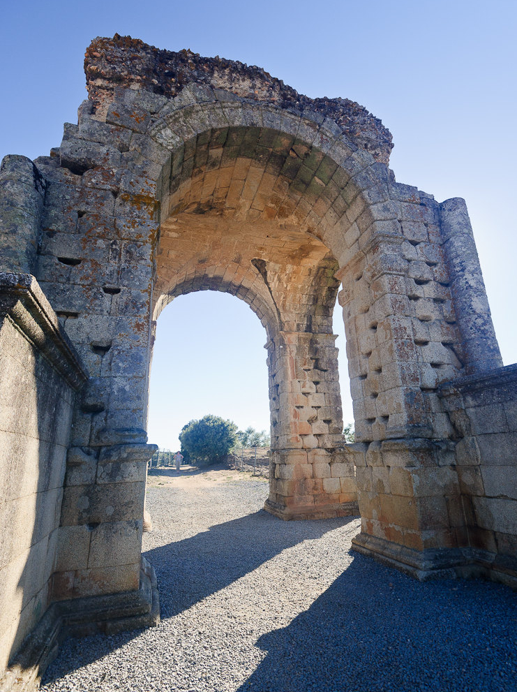 Arco romano de Cáparra, en Oliva de Plasencia (provincia de Cáceres, España).